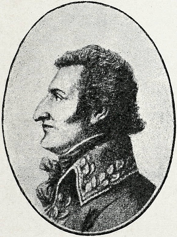 Général_Louis_Caffarelli_du_Falga